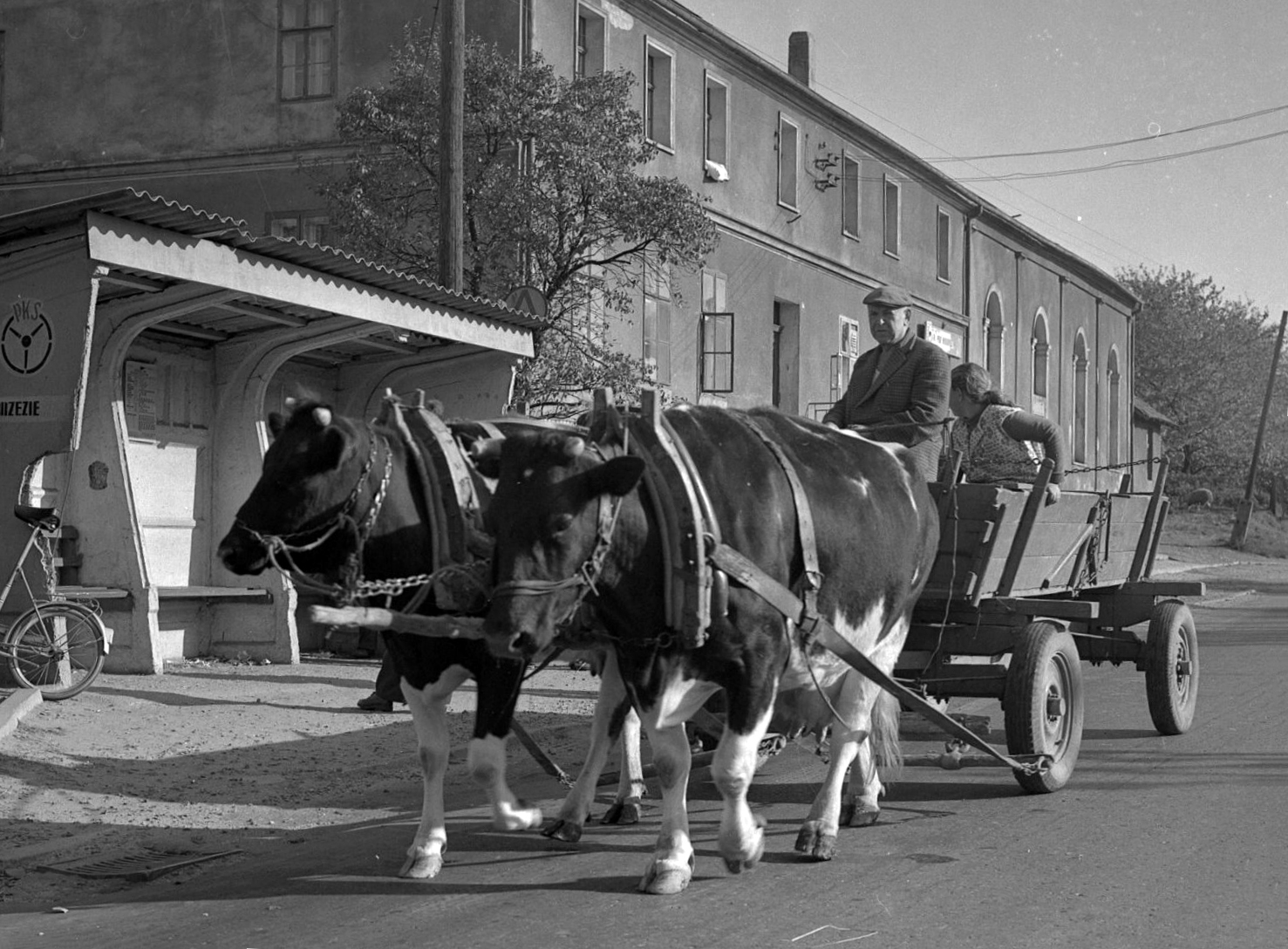 Furmanka ciągnięta przez krowy: Brzezie k. Raciborza, I połowa lat 70. XX wieku